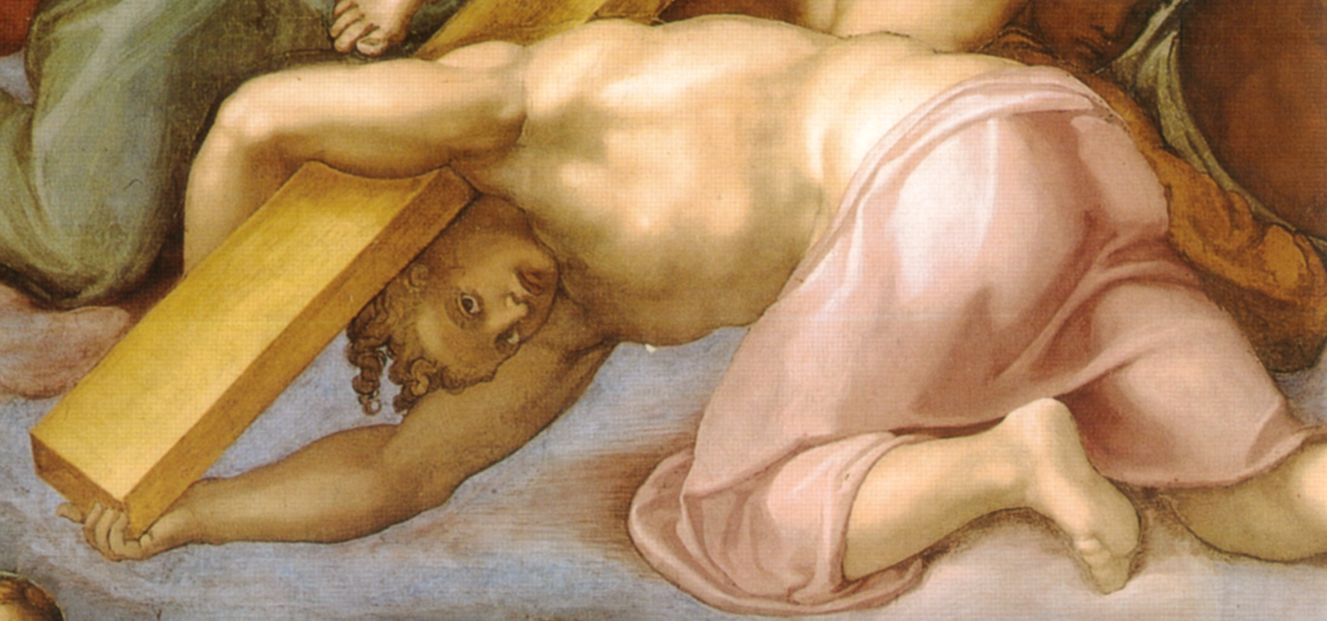 MICHELANGELO Buonarroti Last Judgment Fresco, 1370 x 1220 cm Cappella Sistina, Vatican